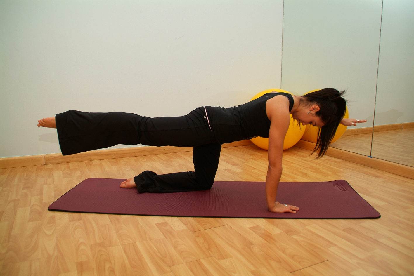 Curso de Instructor de Pilates